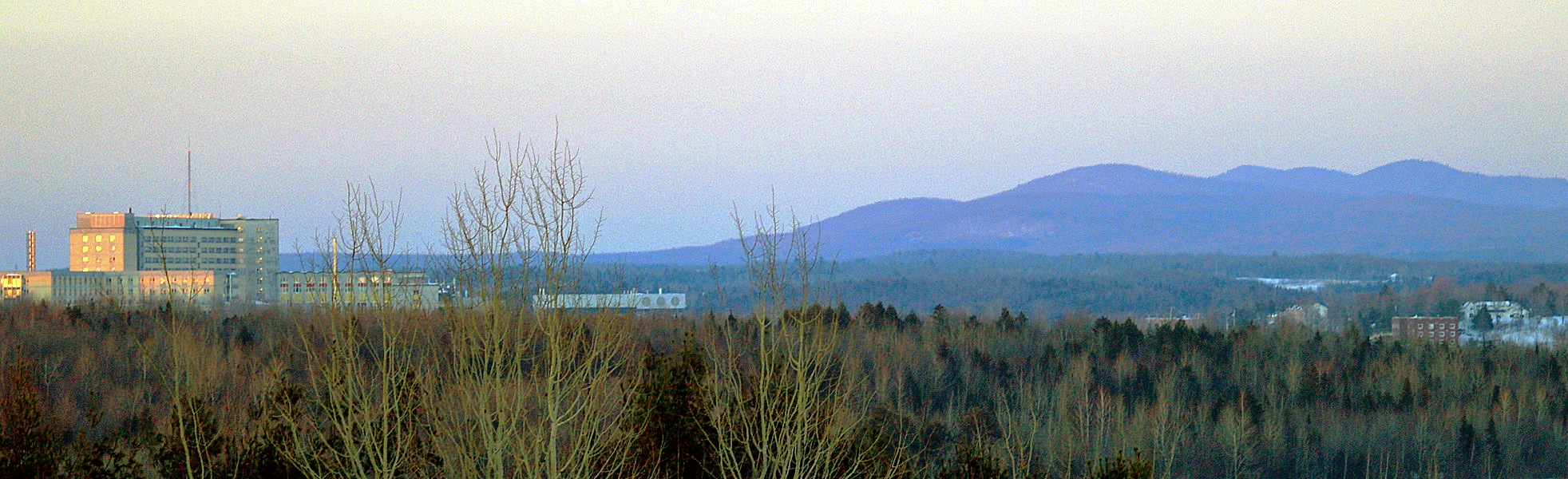 Le CHUS de l'arrondissement Fleurimont aux limites de la ville, avec les monts Stoke à droite.